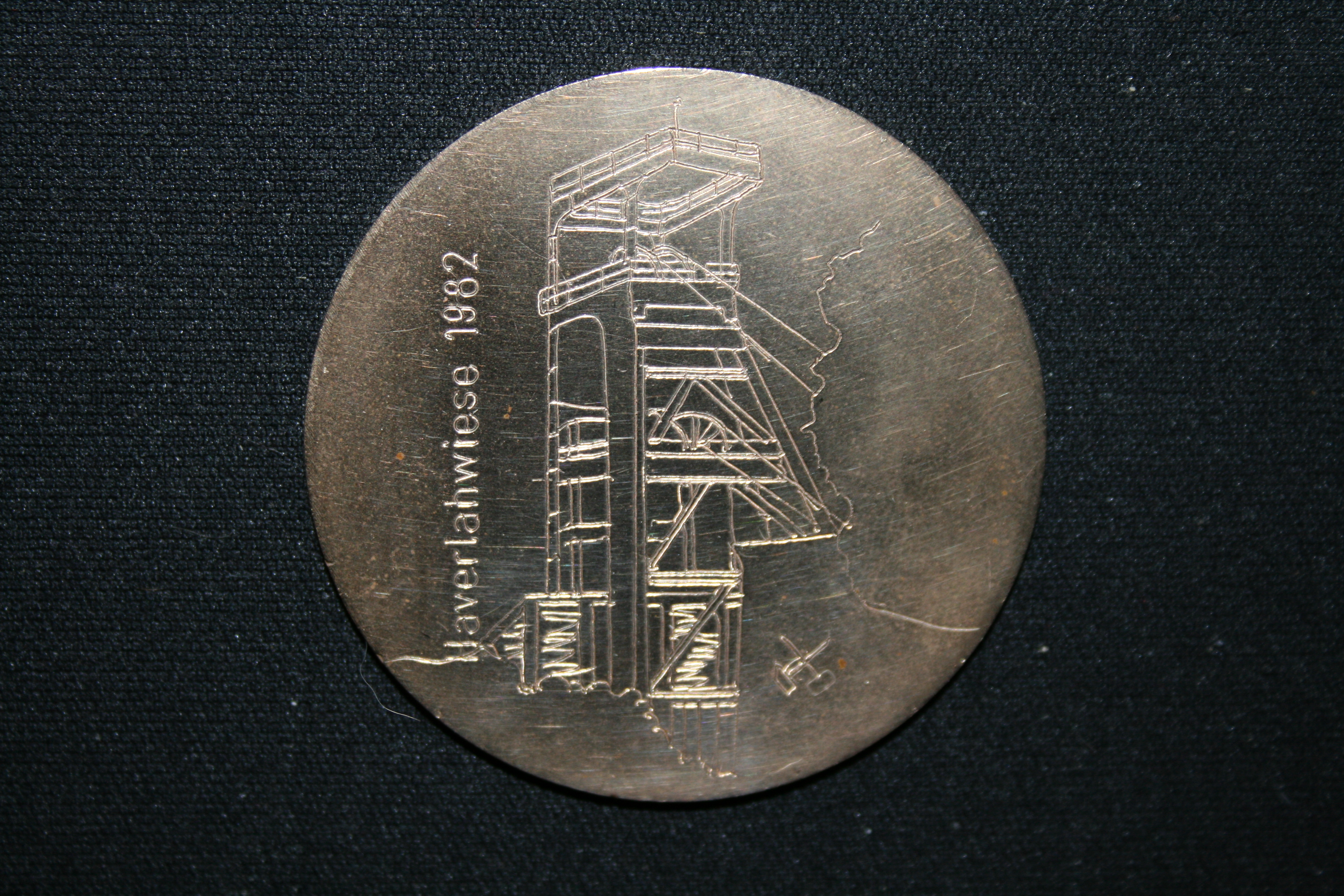 Gedenkmedaille an die Schließung HW Rückseite